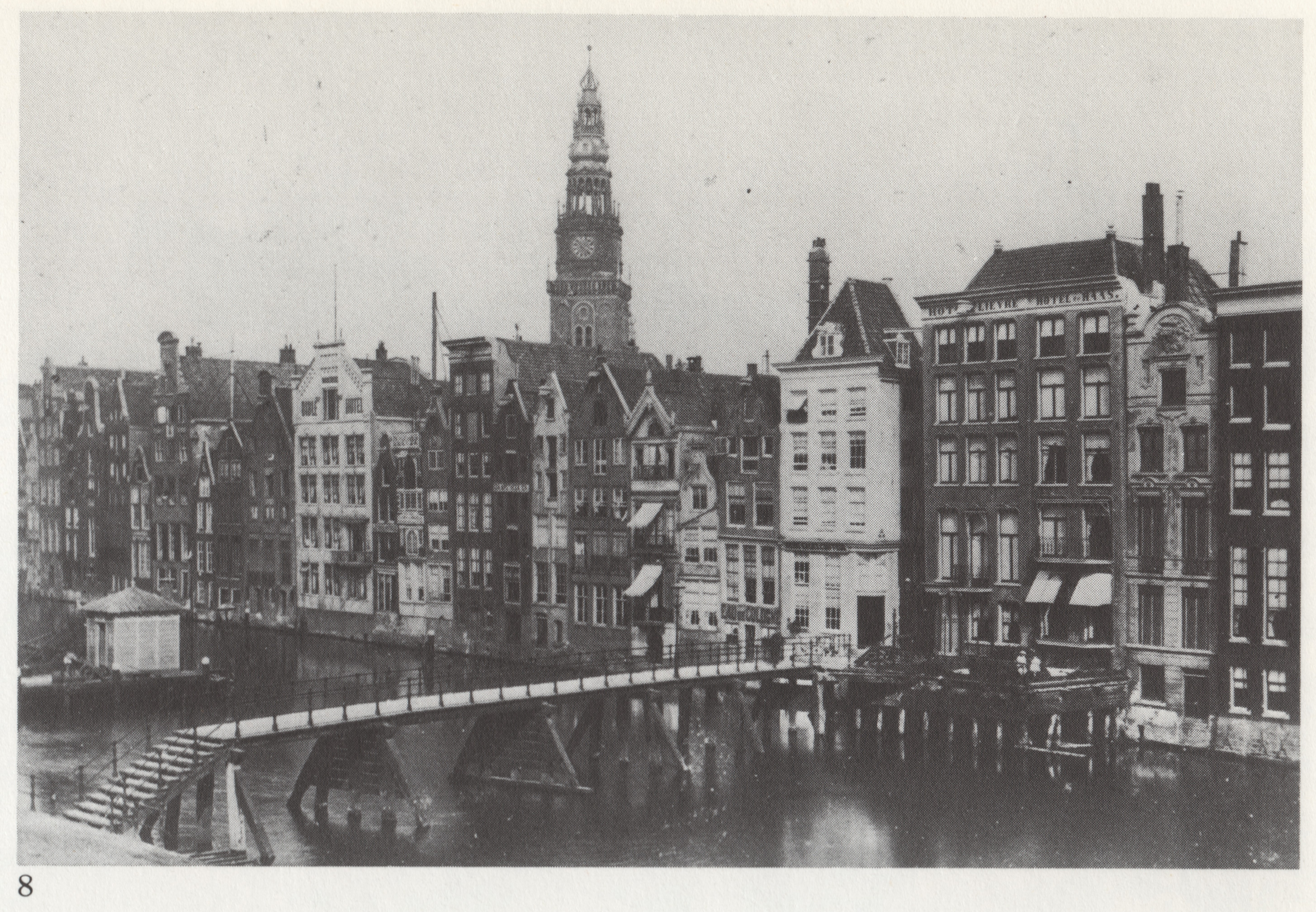 Damrak met Papenbrug en Papenbrugsteeg (nu Beursplein). A.T. Rooswinkel, ~1870.